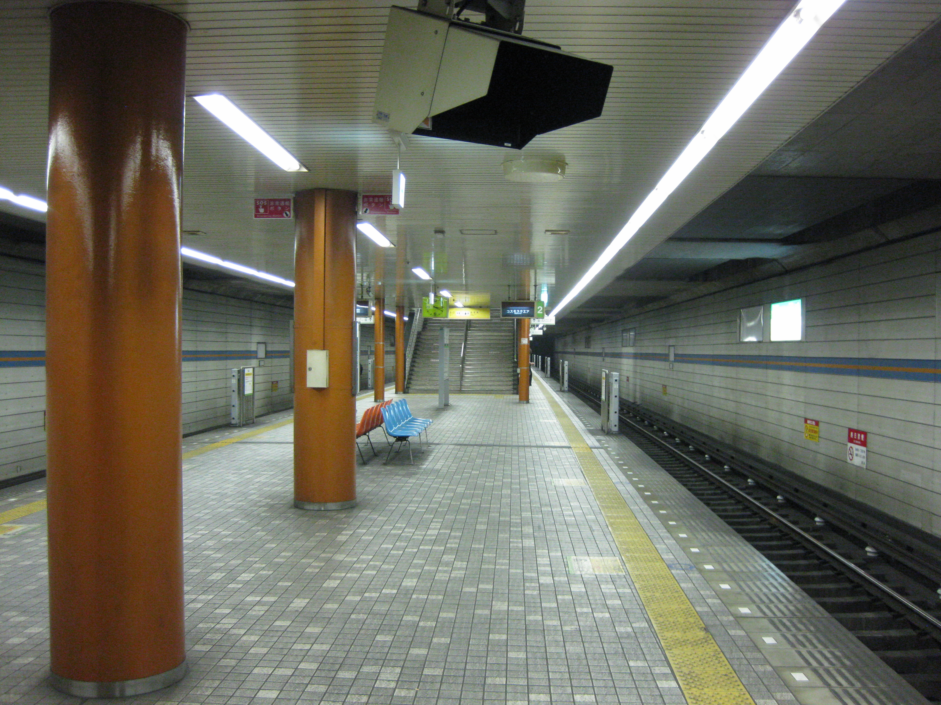 荒本駅プラットホーム